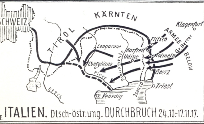 Karte Seite 66: Italien Dteutsch-Österreich-ungarischer Durchbruch 24.10.-17.11.1917